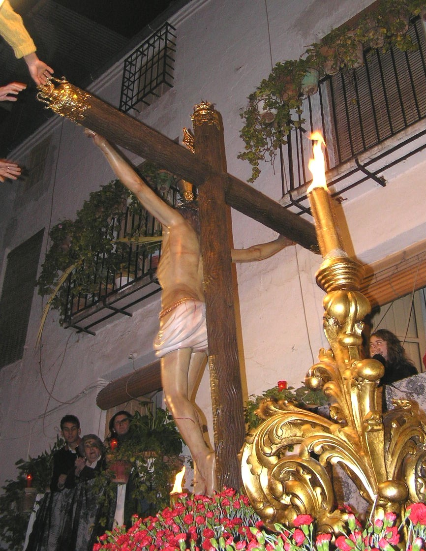 Procesión del Cristo de la Vera-cruz, el Miércoles Santo